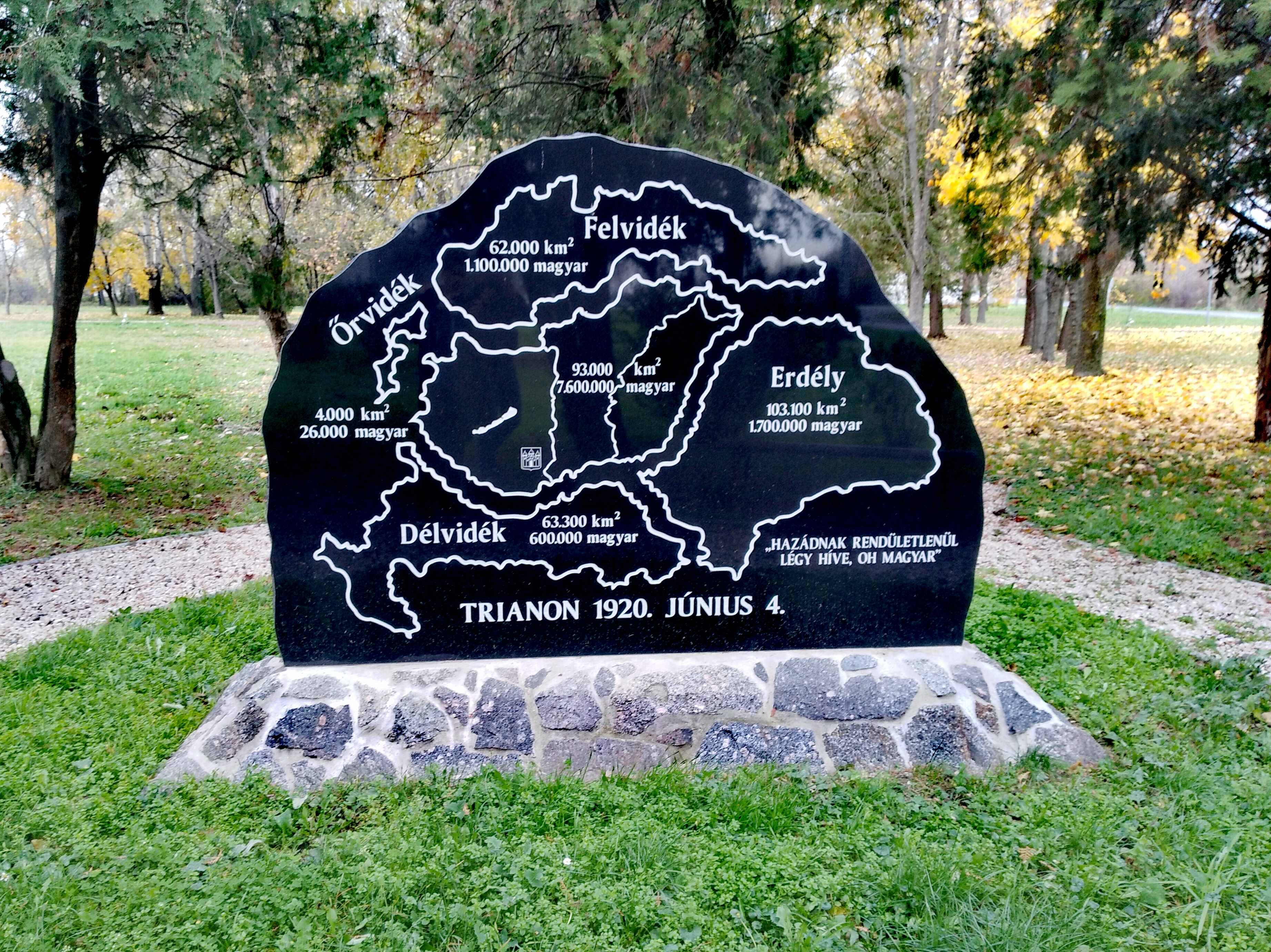 A Bátaszéki Trianon emlékmű 2019-ben.